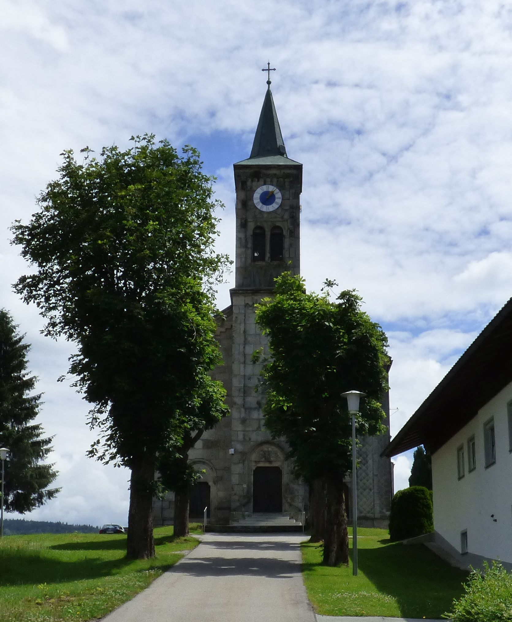 Herzogsreut)